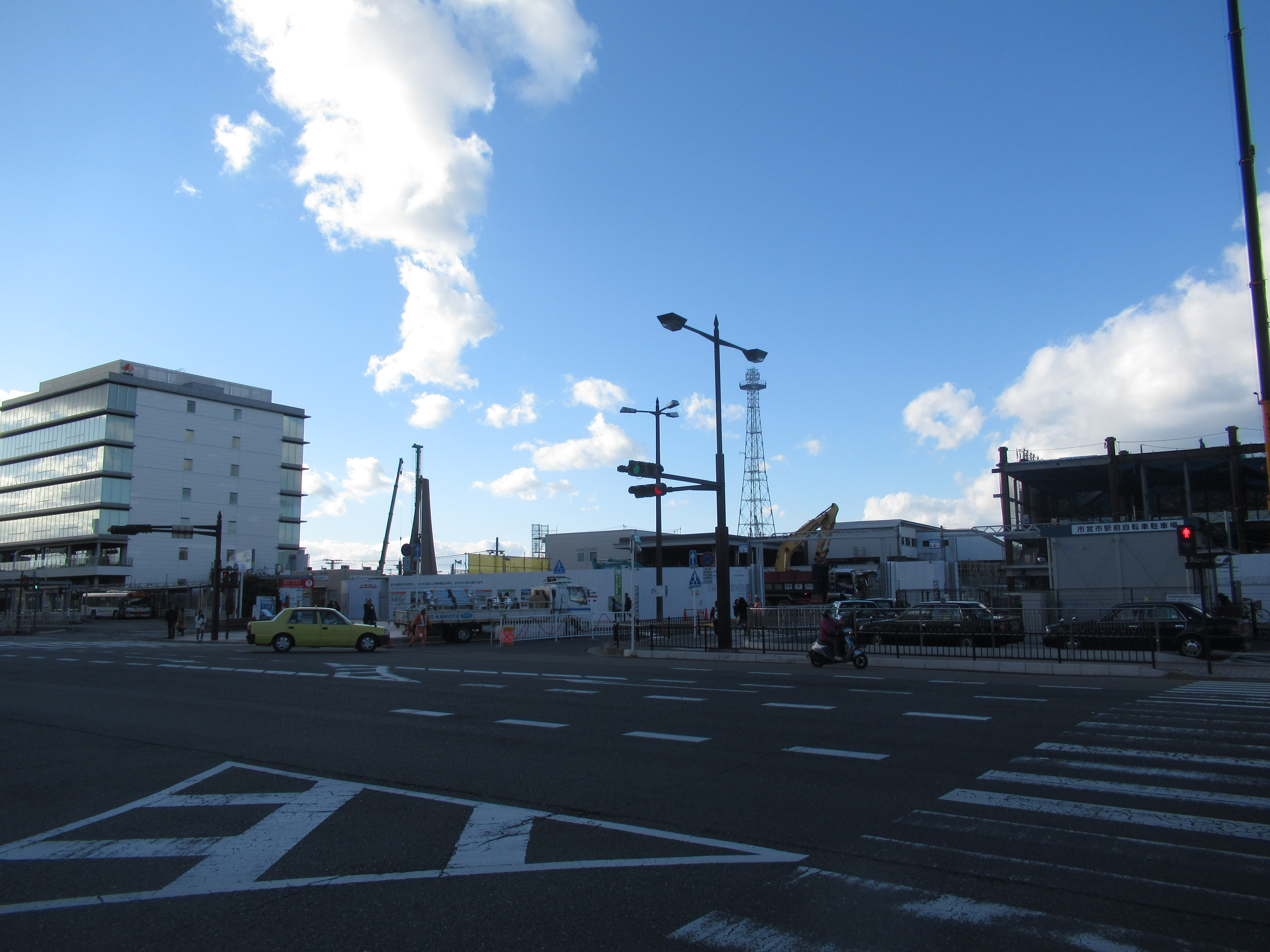 工事中の和歌山市駅(2018-12-27)